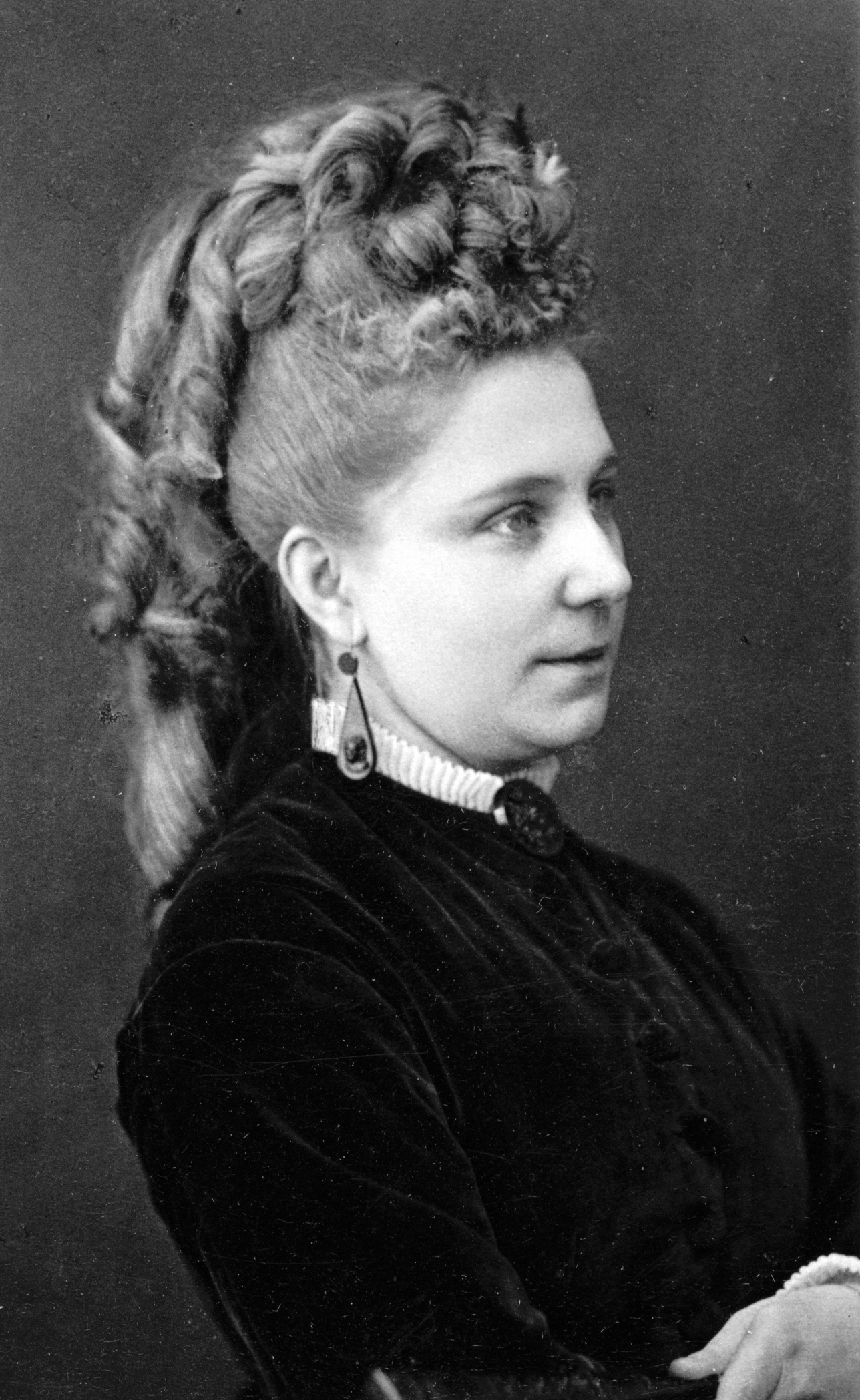 Ida Basilier, sångare vid Kungliga Operan 1875